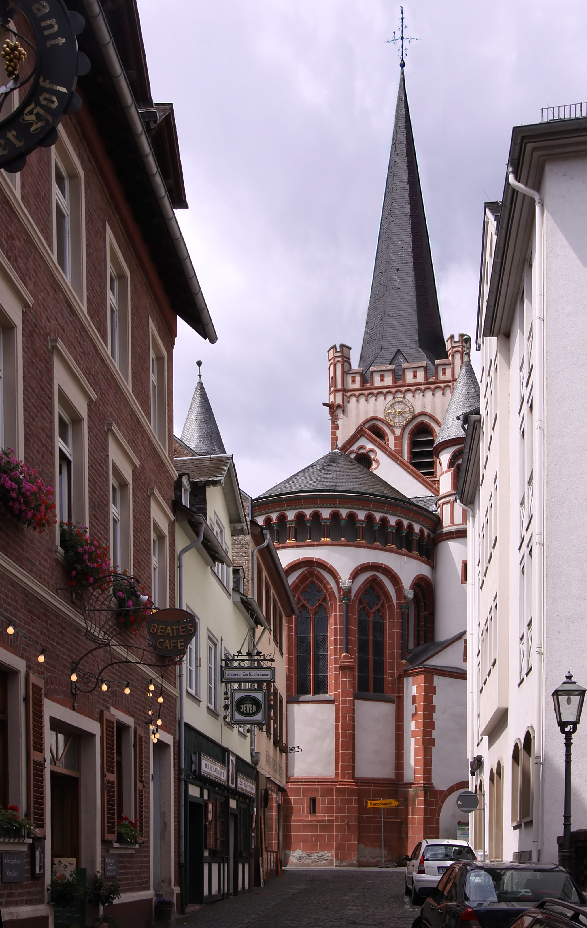 Bacharach am Rhein/Deutschland - Pfarrkirche St. Peter, Chorfassade mit von Rundtürmen flankierter Apsis